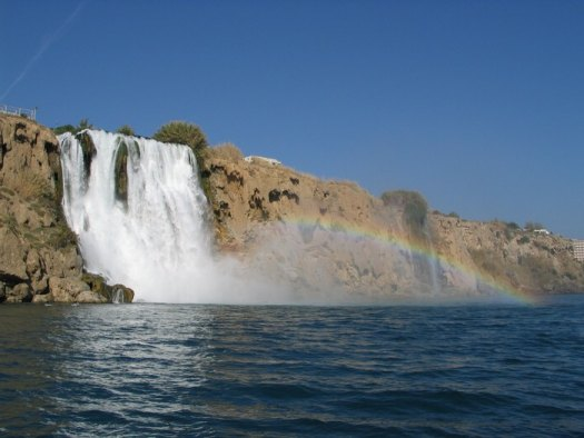 Düden Wasserfall in Antalya